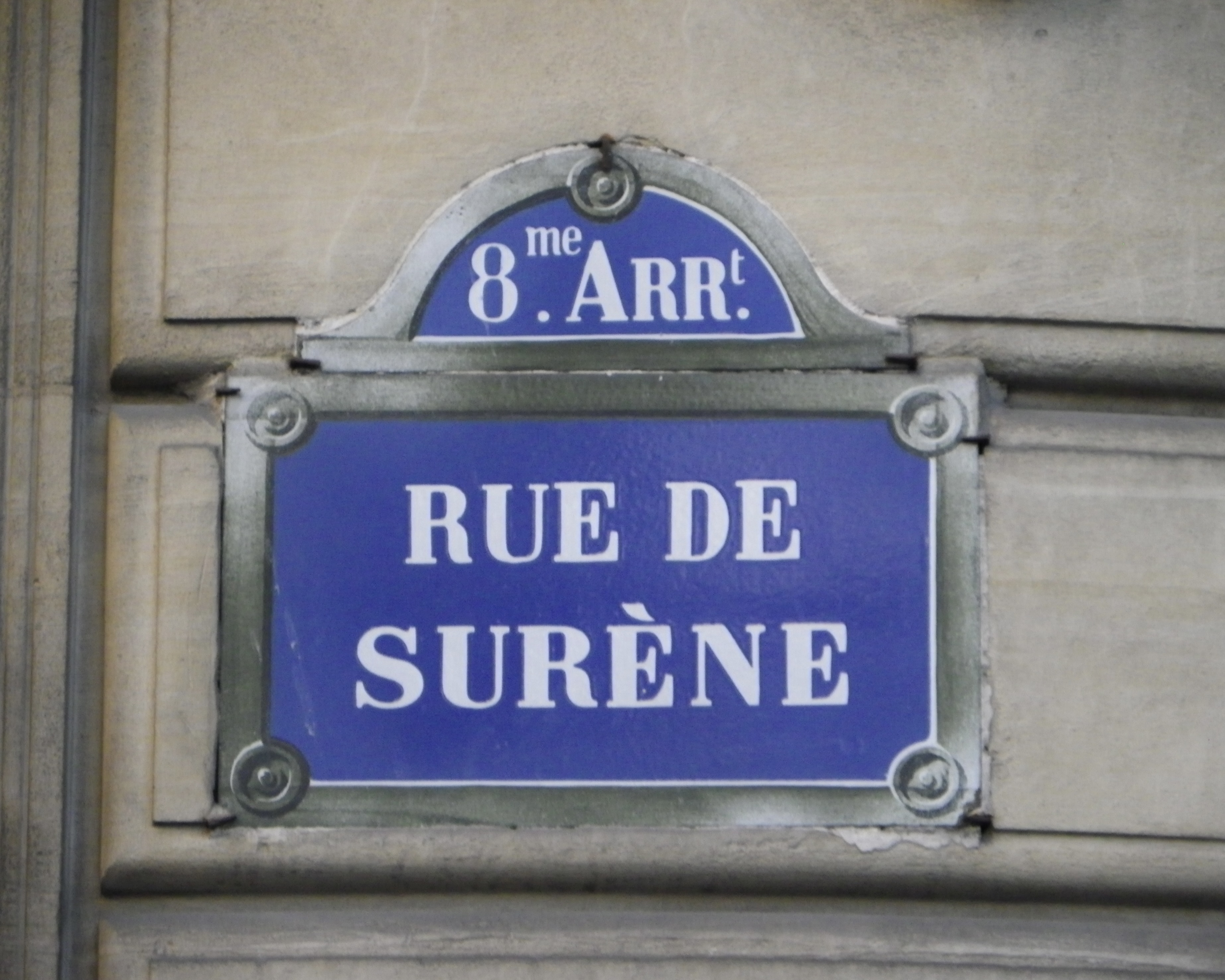 Plaque rue de Surène à Paris